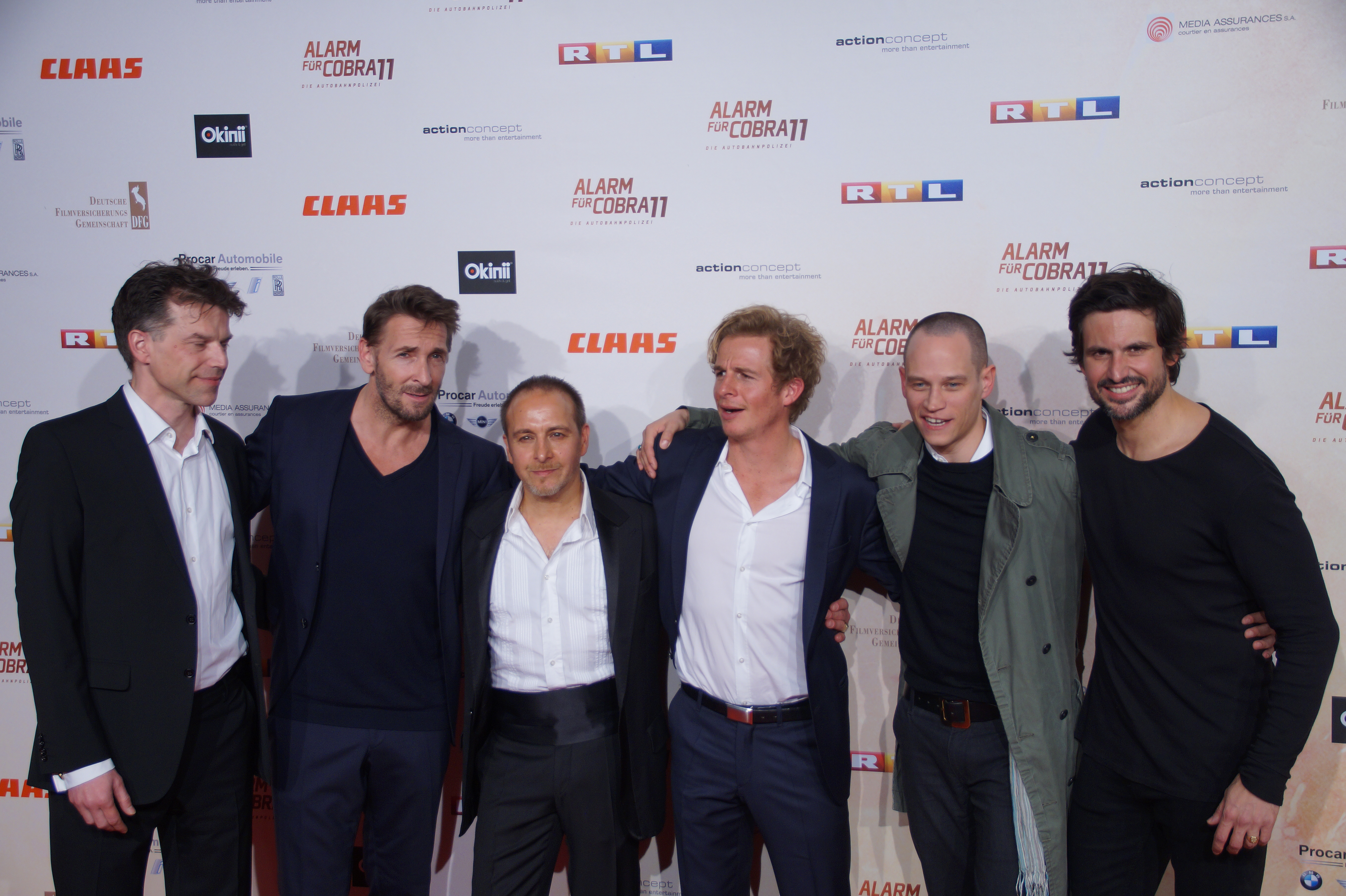 Johannes Brandrup, Mark Keller, Erdogan Atalay, Daniel Roesner, Vinzenz Kiefer, Tom Beck bei der Premiere von der 300. Folge 'Alarm für Cobra 11', April 2016.